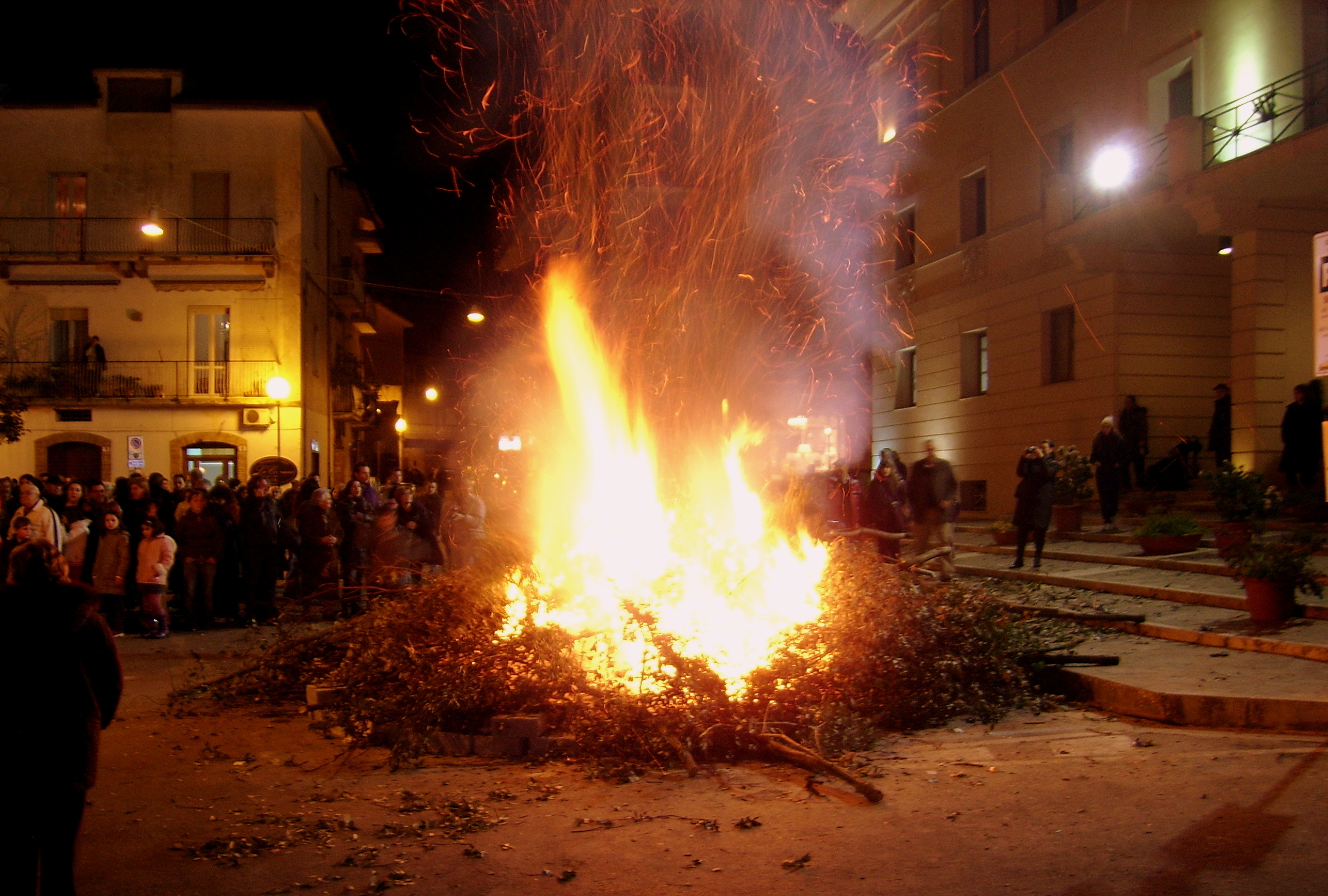 I fuochi di San Giuseppe - Quartiere Piazza Umberto I° Itri (LT)- foto Nicola M.